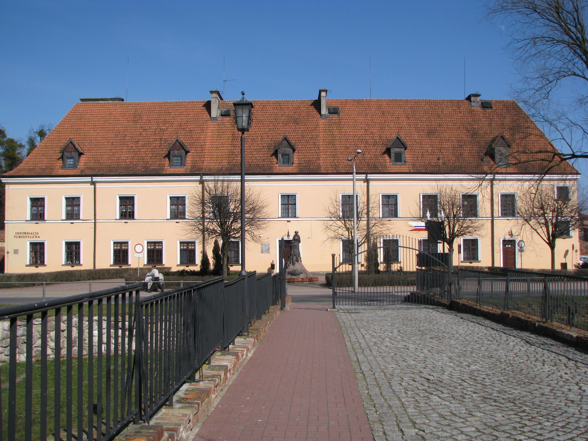 Brodnica renesansowy pałac Anny Wazówny 09.1963.